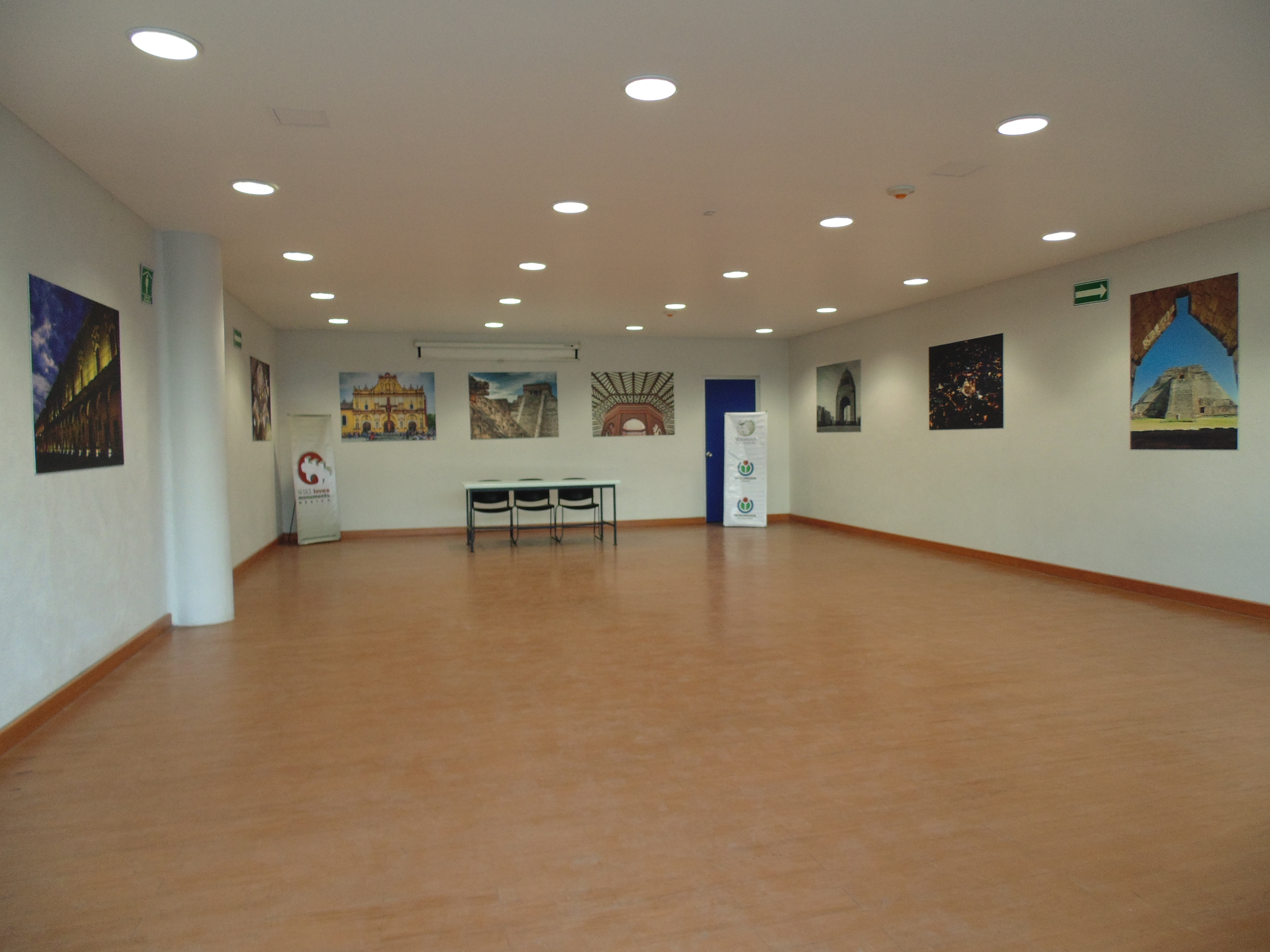 WLMMX 2013 en la Facultad de Filosofía y Letras de la UNAM